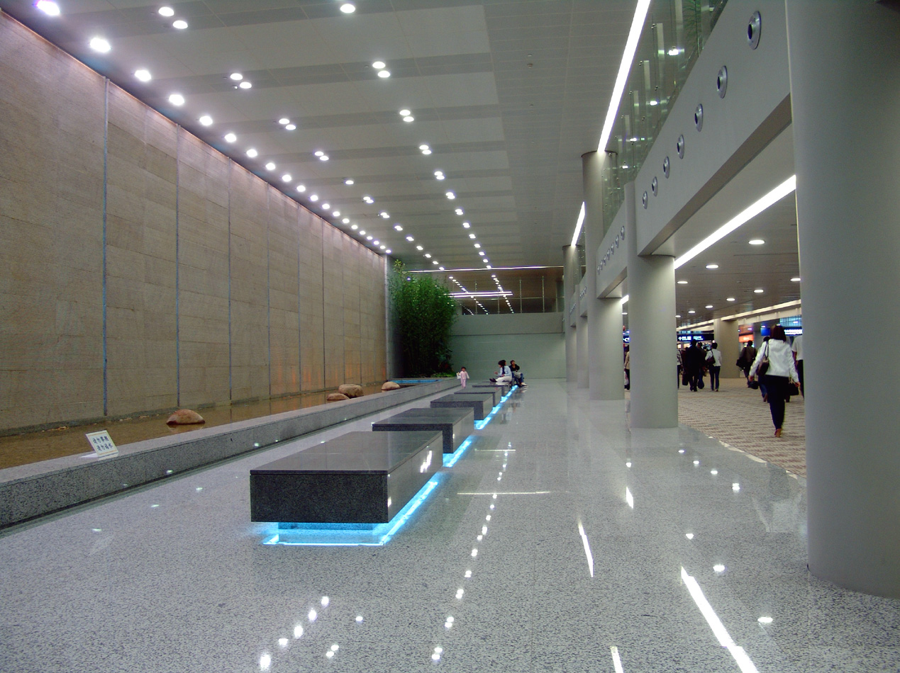 Shanghai Pudong International Airport